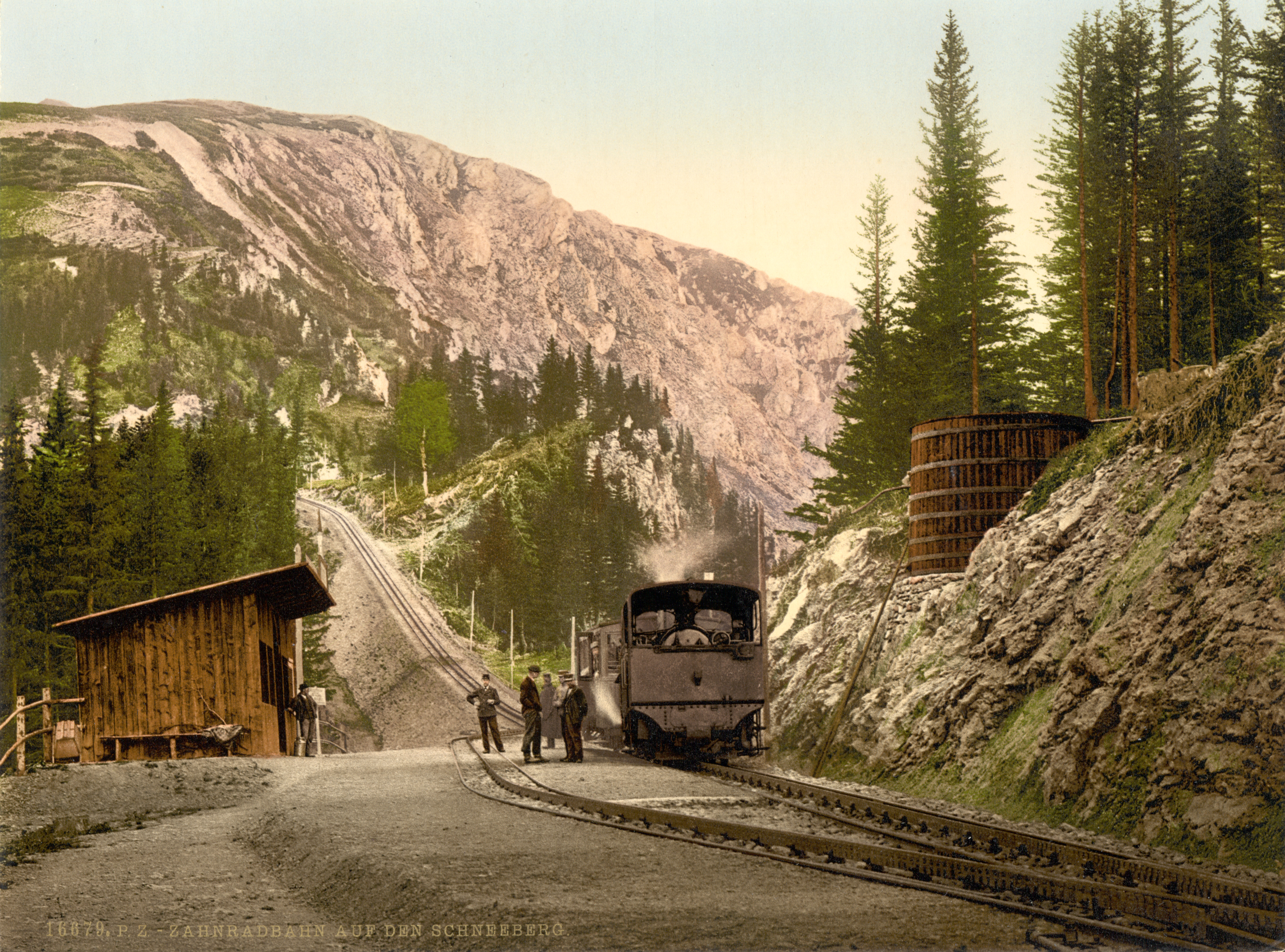 Die Schneebergbahn um 1900. Station „Baumgartner“